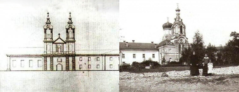 Беларуская (тарашкевіца): Маскалізацыя (русіфікацыя) Вялікага Княства Літоўскага. Мястэчка Алькенікі Троцкага павету. Касьцёл Найсьвяцейшай Панны Марыі пры кляштары францішканаў, помнік архітэктуры барока: аўтэнтычны выгляд (налева) і па частковым руйнаваньні ў выніку маскоўскай перабудовы (направа)